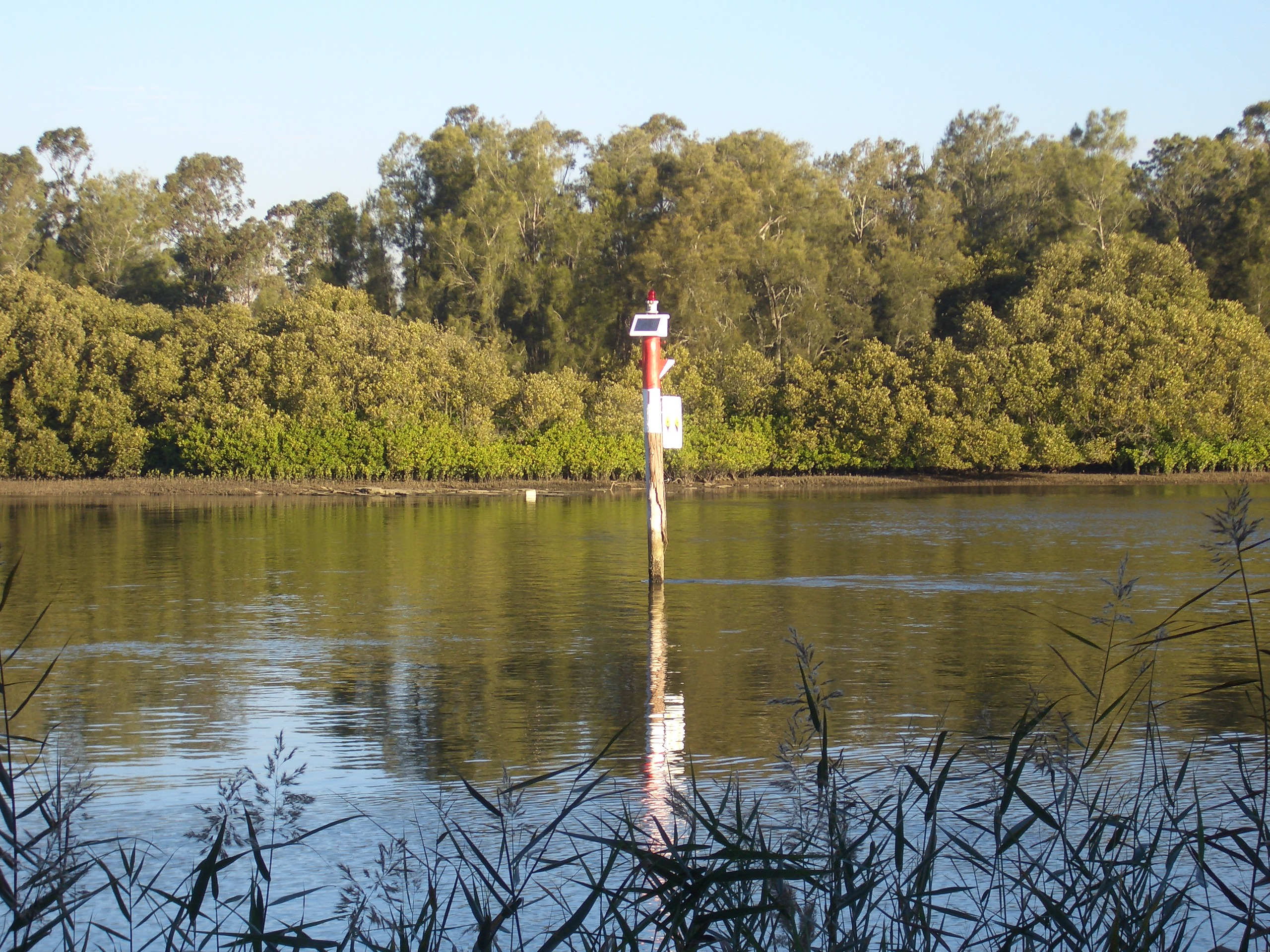 Deepwater Park, Georges River, Milperra